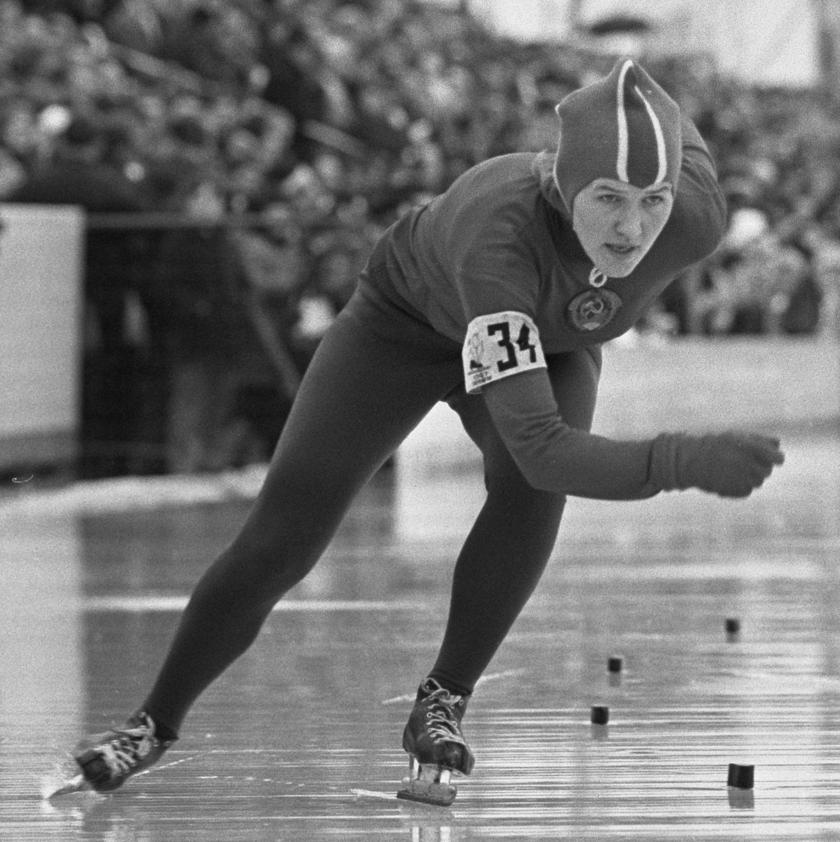 WK schaatsen te Deventer dames, nummer 13 Skoblikova in aktie